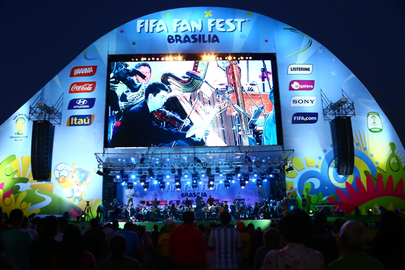 Orquestra Sinfônica do Teatro Nacional Cláudio Santoro (Brasília, DF) apresenta-se na Fifa Fan Fest, Taguatinga, DF